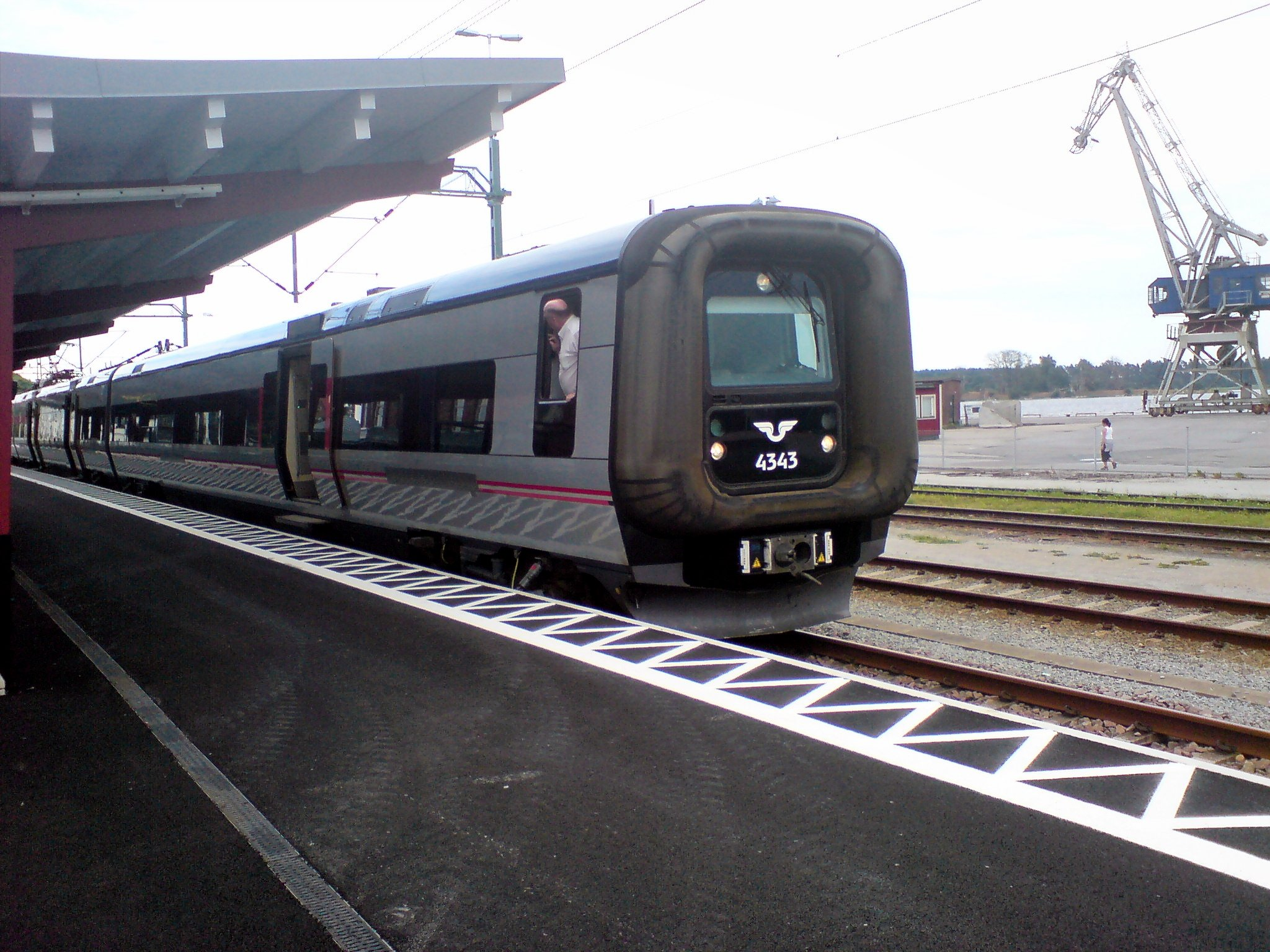 Öresundståg av typ X32 som ersättning för X31 i Sölvesborg 2007-07-11. Under en period användes X32 i väntan på ombyggnad till X31.